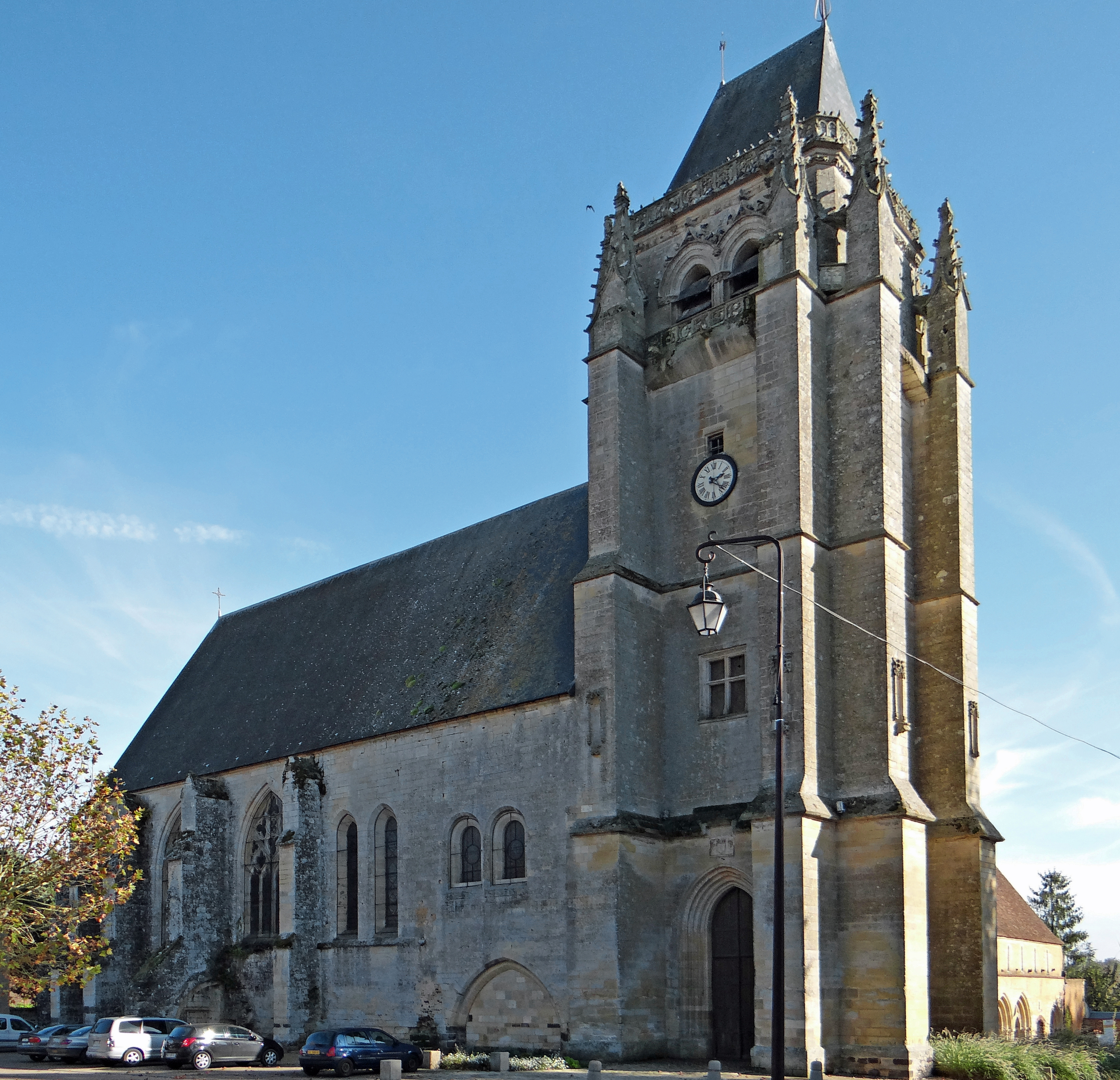 Massay - Abbaye Saint-Martin - Église Saint-Paxent avec la tour-porche Chamborant